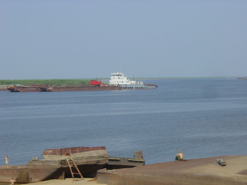 Река Печора около Нарьян-Мара. Источник